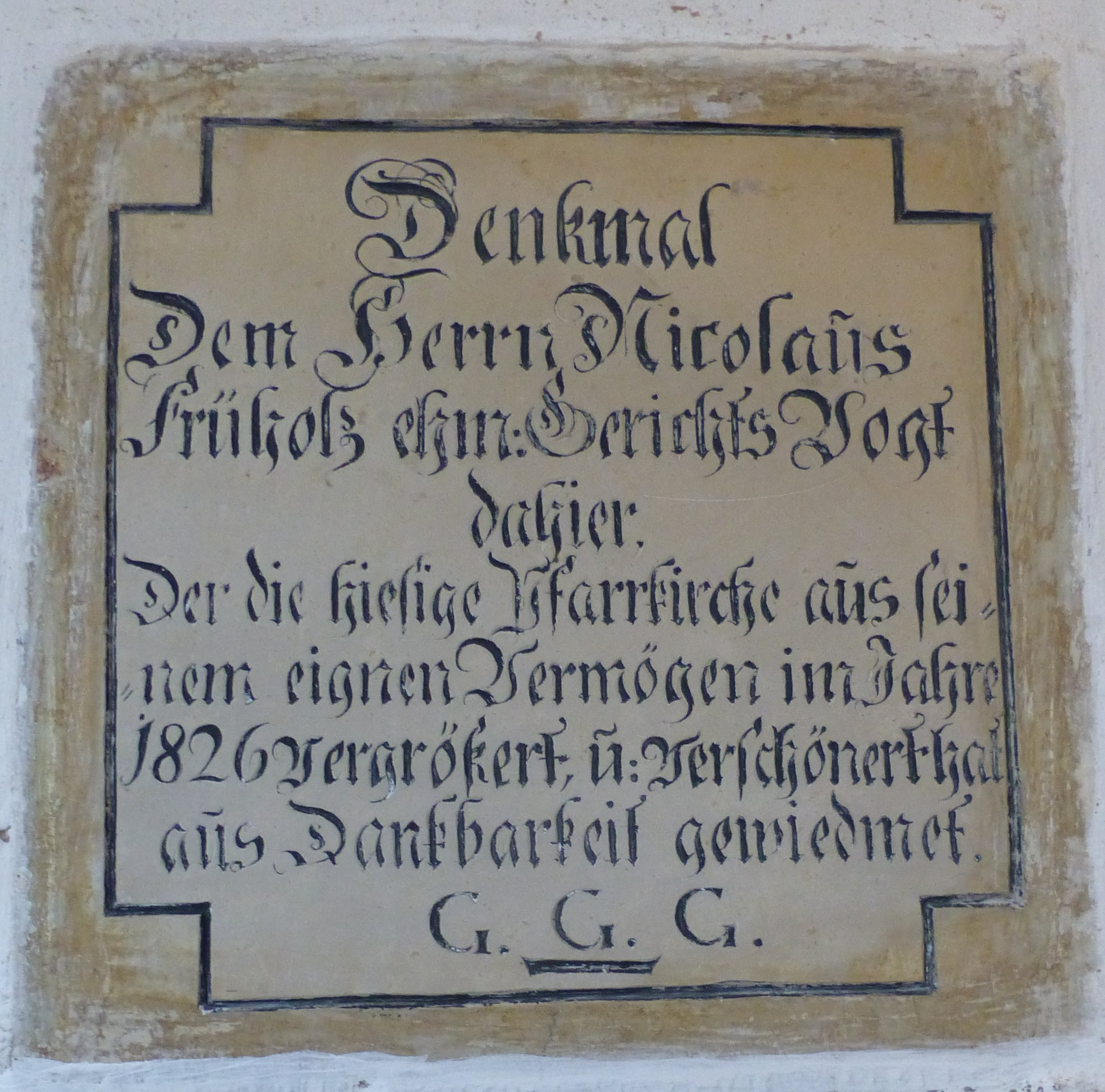 Gedenkplatte für den ehemaligen Gerichtsvogt in Emmenhausen (Waal), Nikolaus Früholz